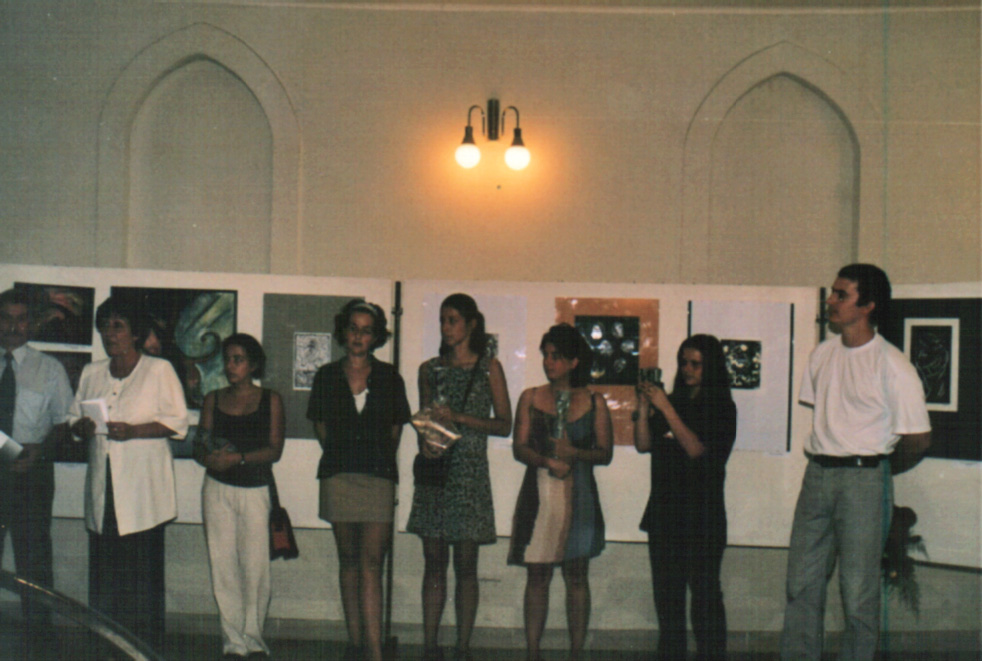 Hamza Studio-Tánc, Jászberény